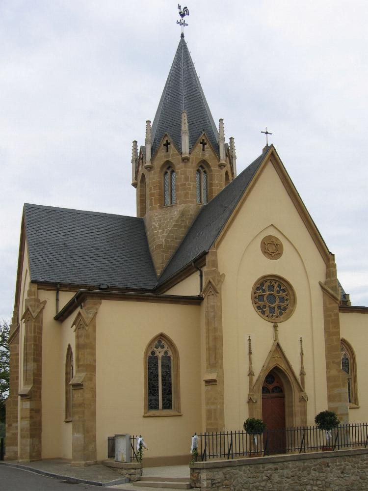 D'Kierch vu Siren vu baussen. Foto vum Pear 12:20, 5 September 2006 (UTC) 02.09.2006. Siren Kategorie:Gemeng Weiler zum Tuerm